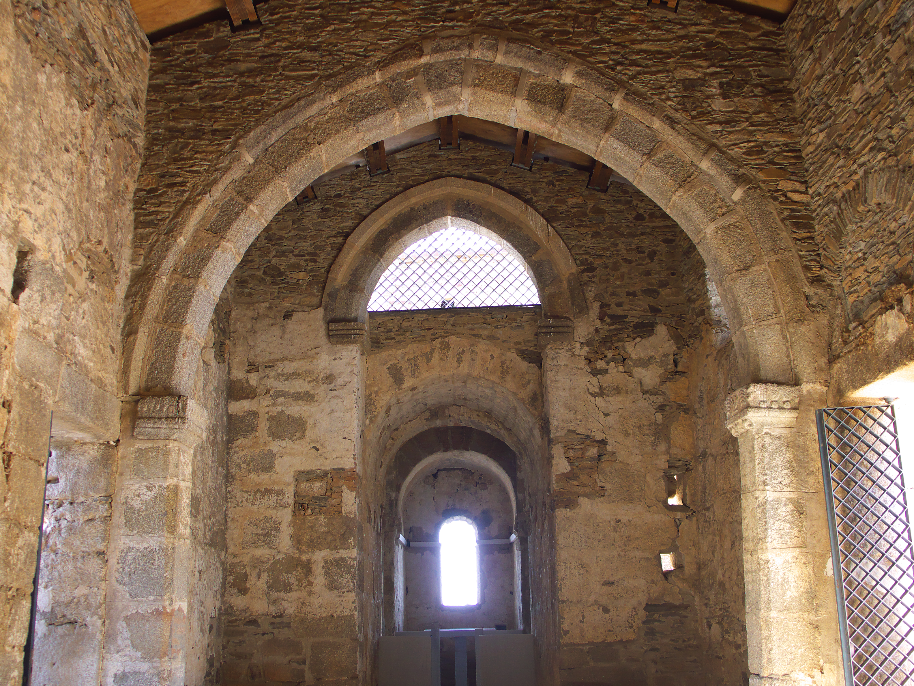 Vista interior del coro y aula. En el siglo XV se restaura la iglesia con recursos góticos.